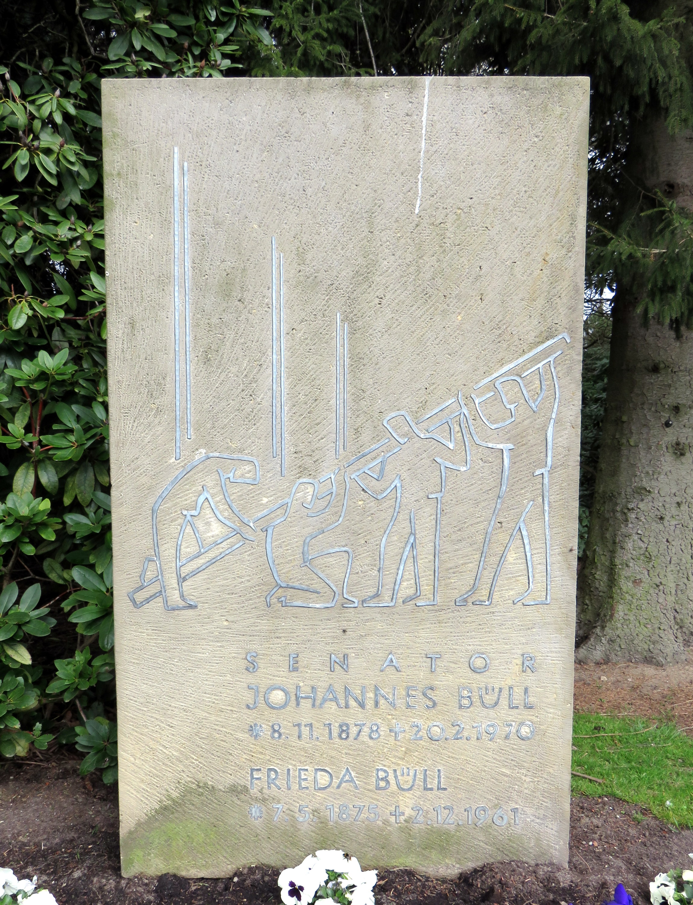 Grabmal des Hamburger Politikers Johannes Büll auf dem Hamburger Friedhof Ohlsdorf, Planquadrat Q 5 (oberhalb des Althamburgischen Gedächtsnisfriedhofs).